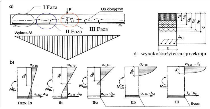 Fazy pracy elemantu żelbetowego poddanego zginaniu.